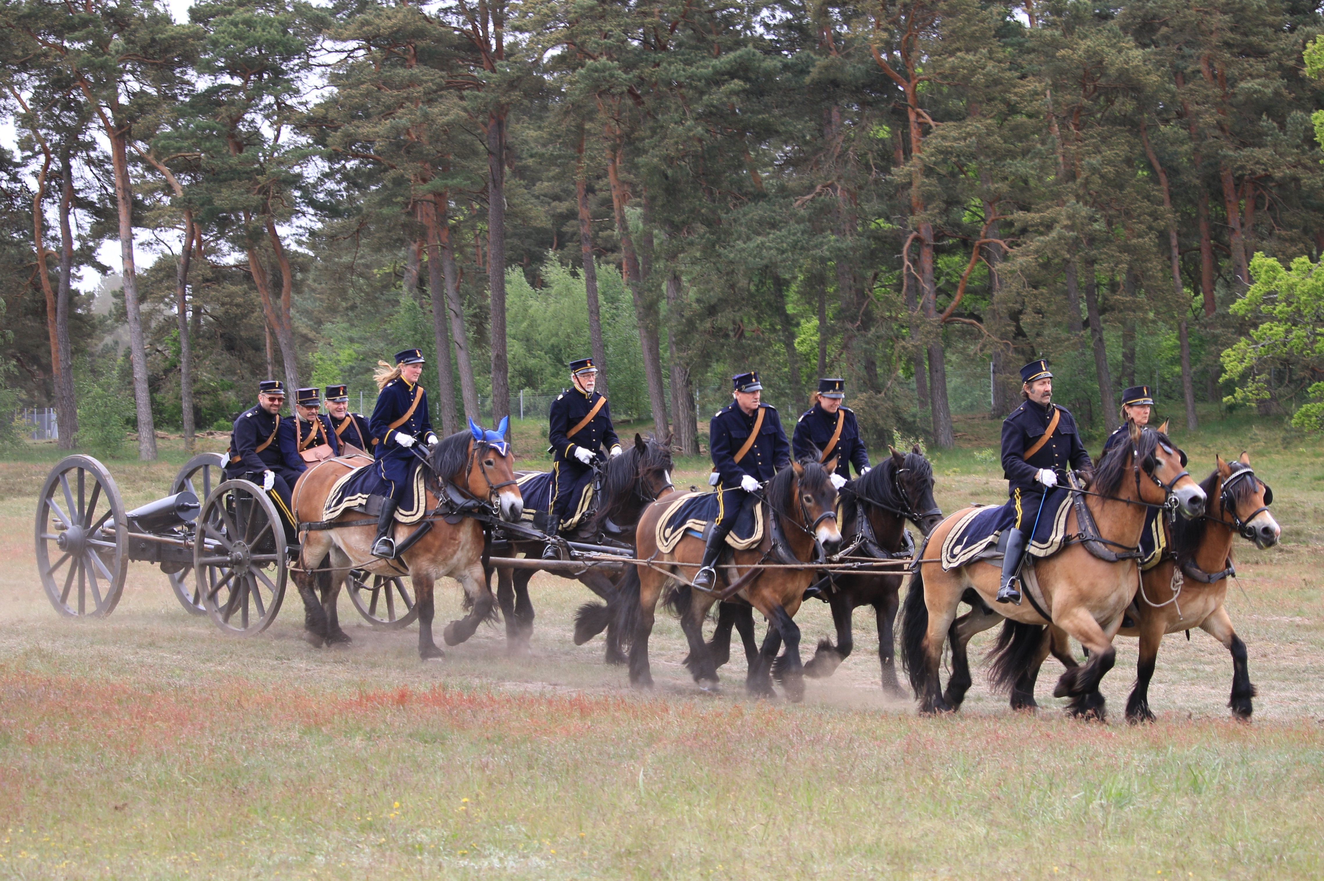 Ridande artilleri Revinge 2019